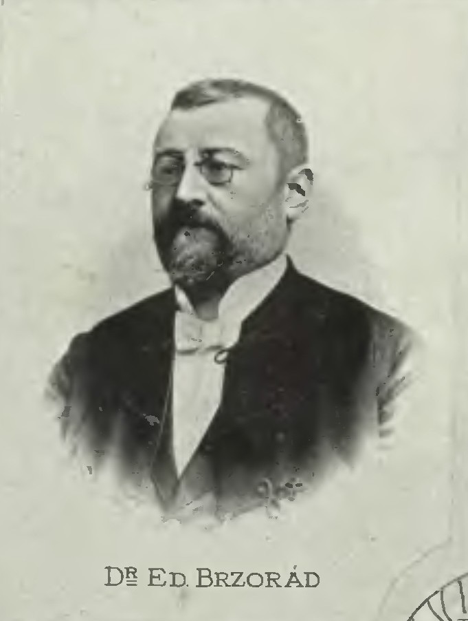 Portrét – Eduard Brzorád (1857-1903), Český politik